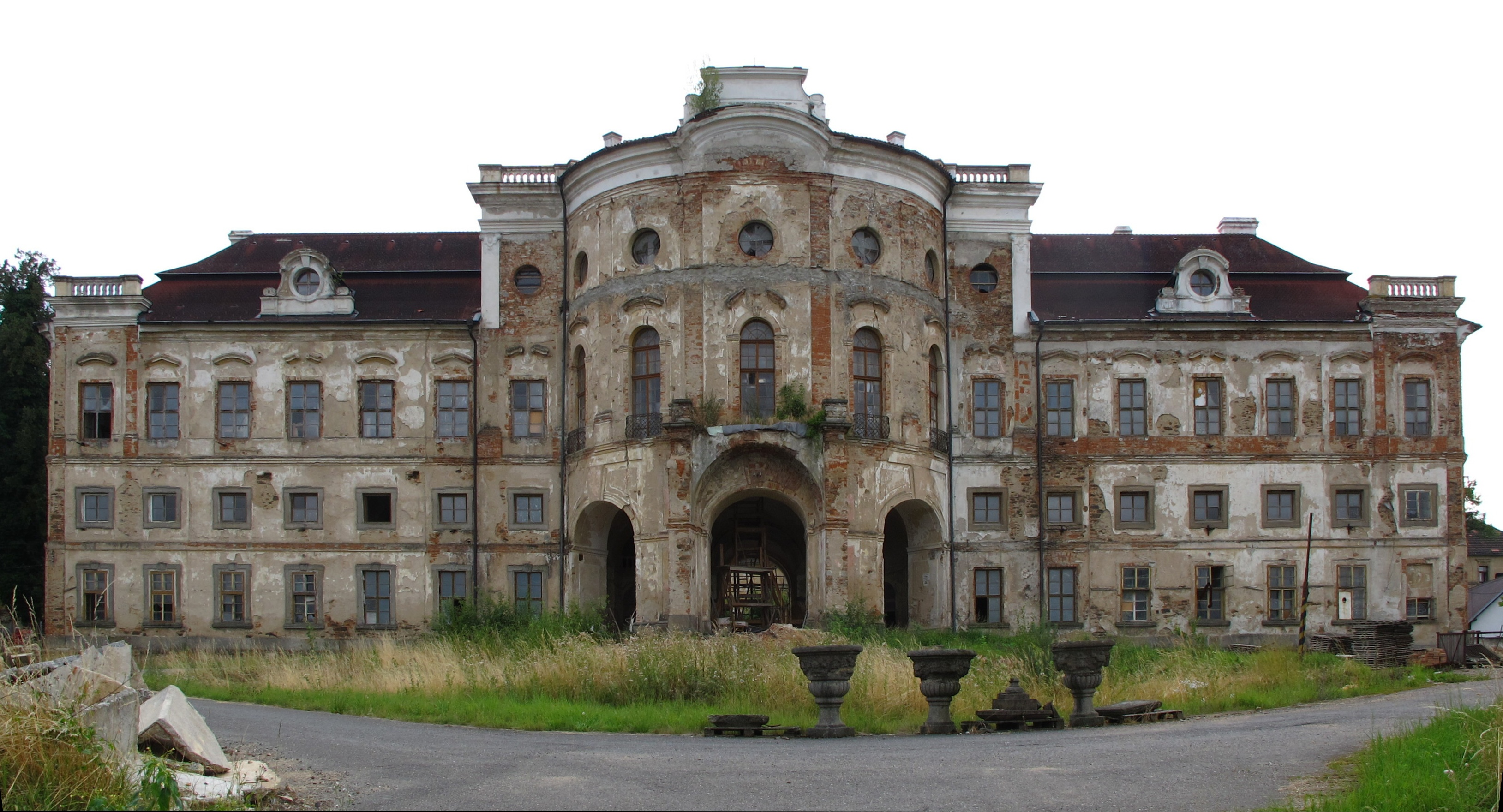 Zámek Týnec u Klatov je vrcholně barokní stavba, návrh vytvořil italský architekt Giovanni Battista Alliprandi.